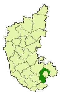 Bangalore Rural dist